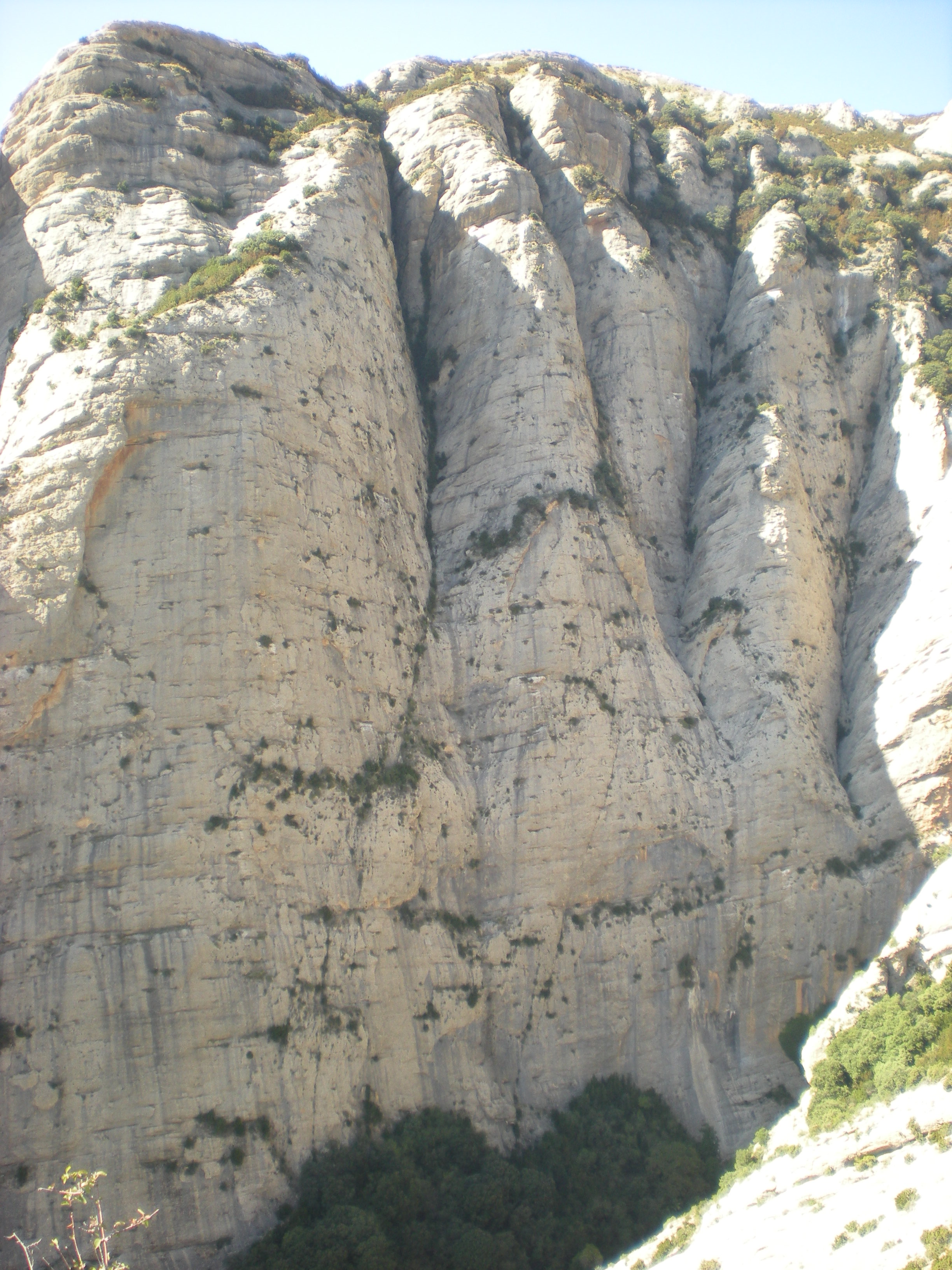 Pared rocosa barranco acceso San Martín de la Bal d'Onsera